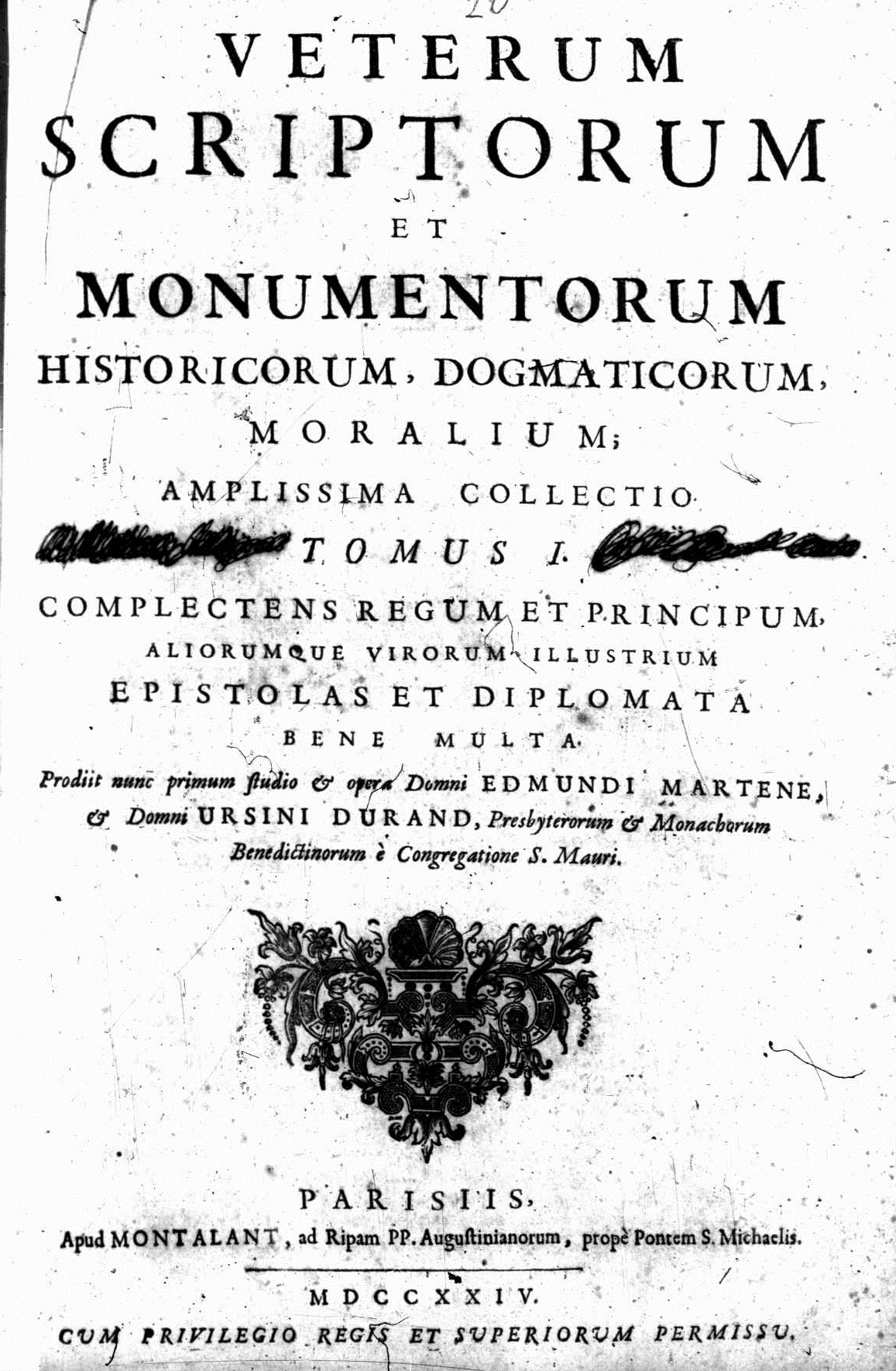 Frontespizio